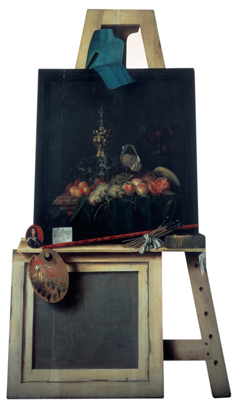 Cornelius Norbertus Gijsbrechts (1657-1683), Trompe l'oeil-staffeli med frugtstykke. Udskåret i træ, 1670-1672